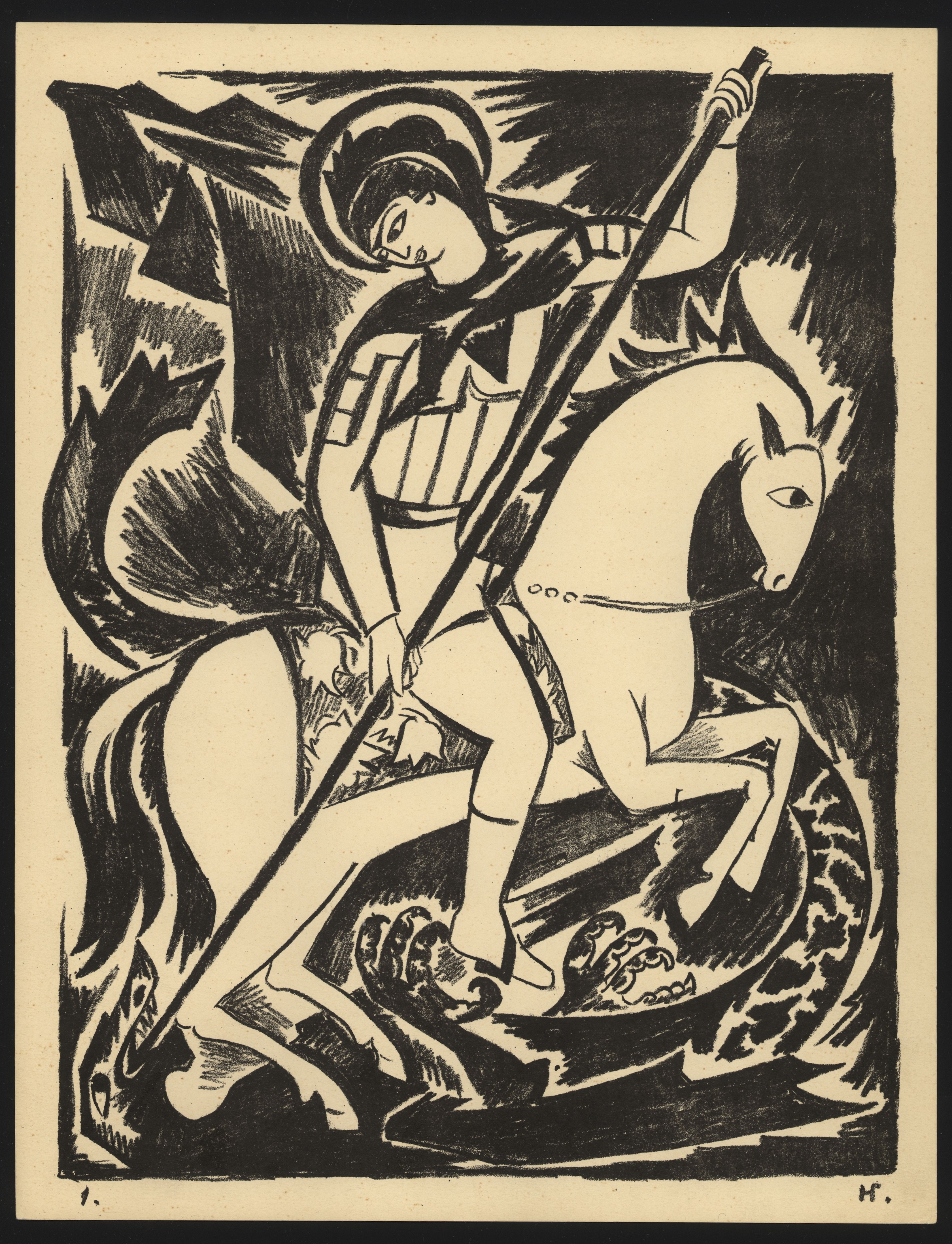 Святой Георгий Победоносец